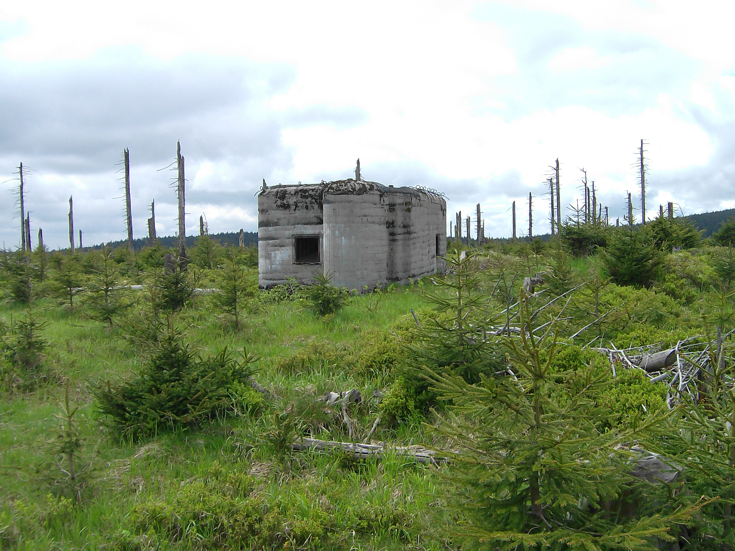 Schron (bunkier) - Ropik, Typ B. Masyw Śnieżnika, zbocze Susiny (grzbiet pomiędzy Morawą a Starym Miastem pod Śnieżnikiem